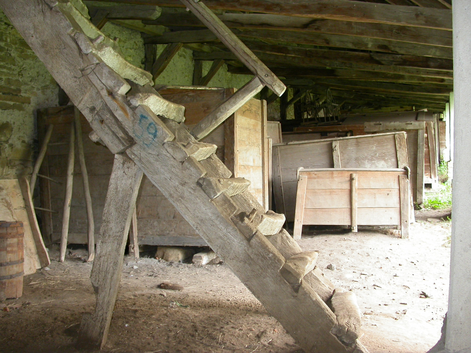 Incintă fortificată, sec. XV 02